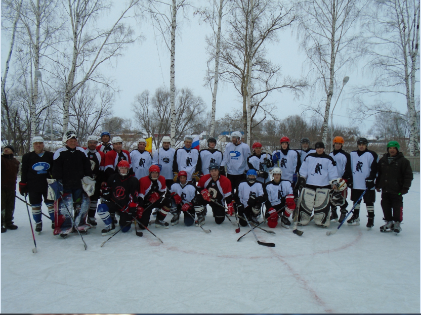 Традиционный турнир памяти Николая Можаева